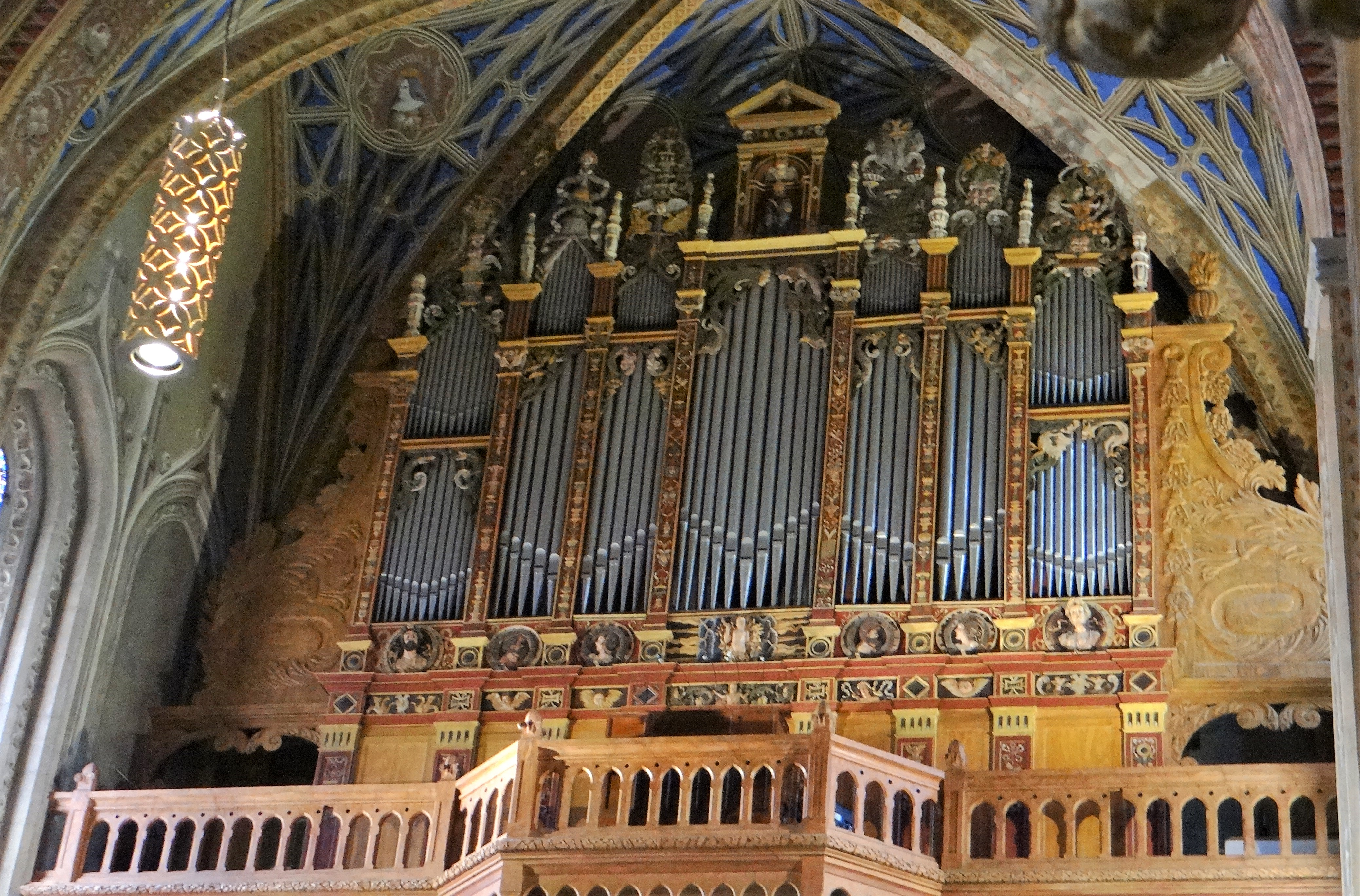 Lavaur - Cathédrale Saint-Alain - Orgue de Tribune